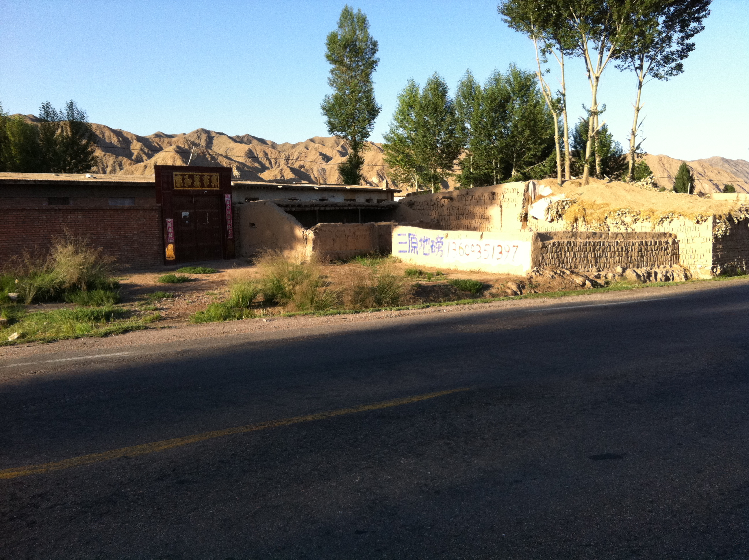 Yongchang, Jinchang, Gansu, China